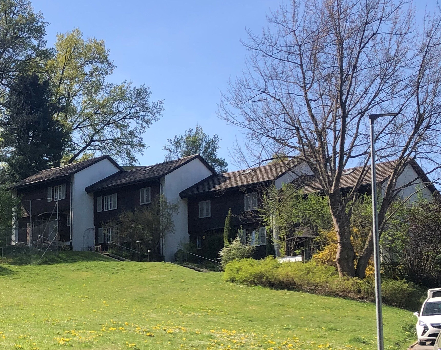 Hohliebe Siedlung